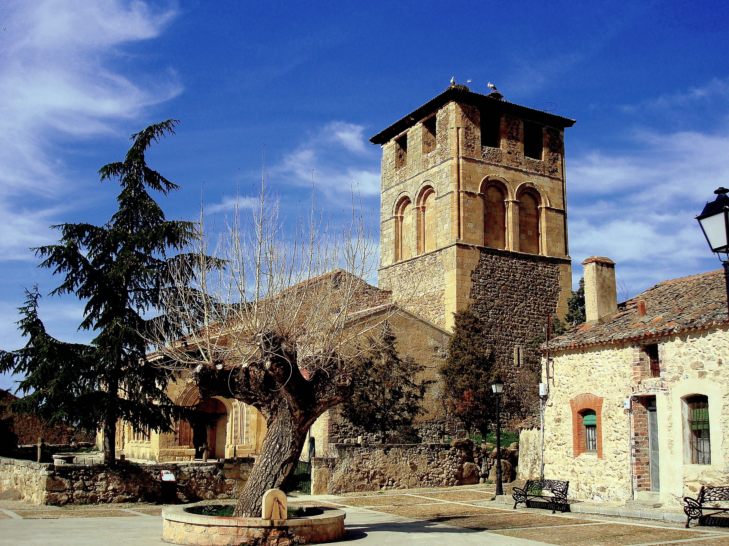 San Miguel de Sotosalbos